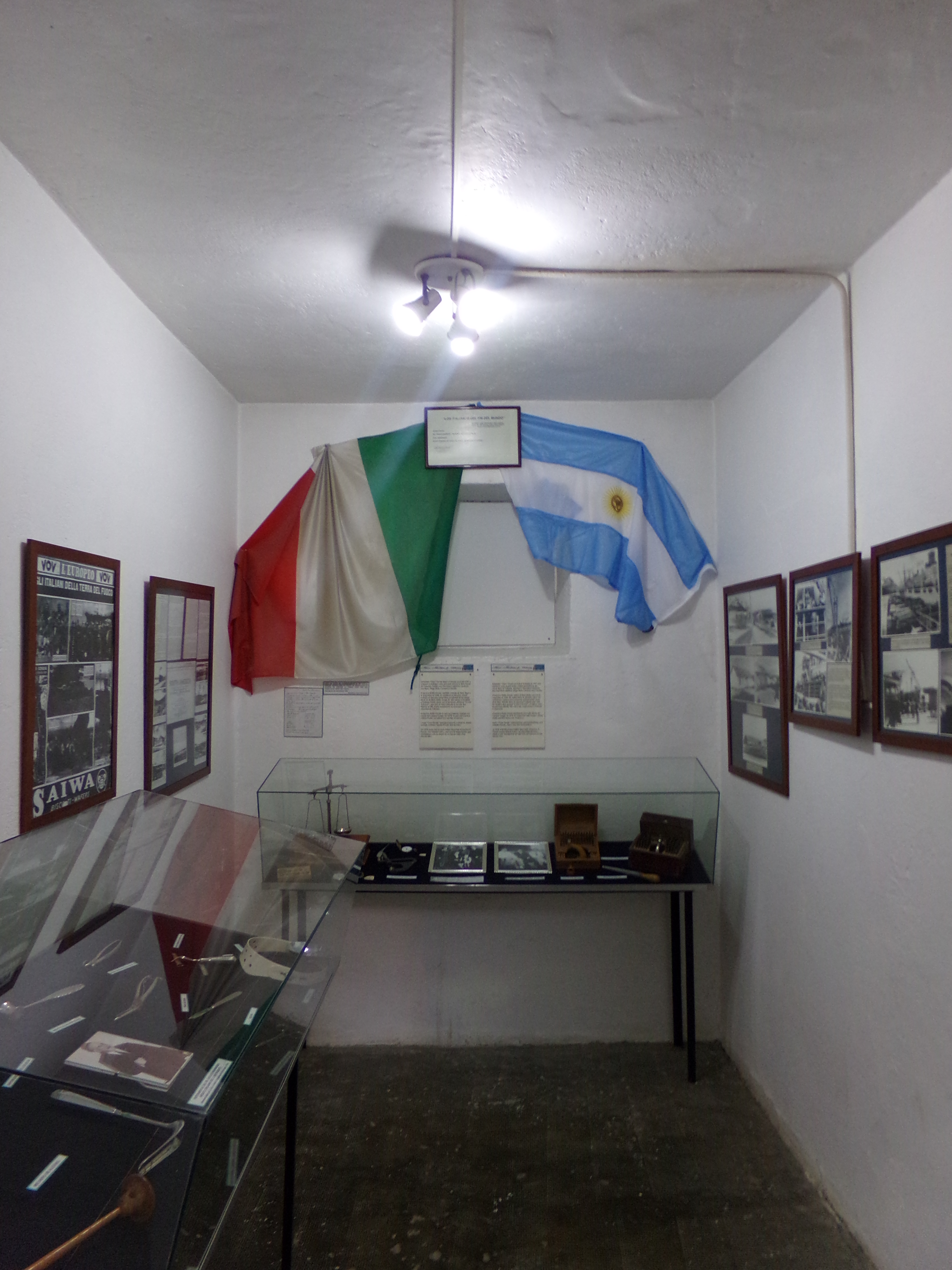 Museo Maritimo y Ex Presidio de Ushuaia, TDF, Arg